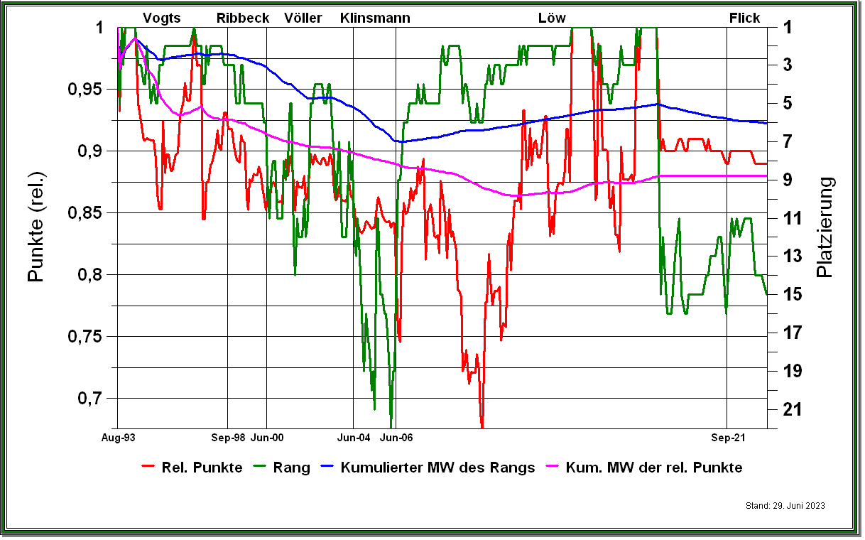 Die Deutsche Nationalmannschaft in der FIFA-Weltrangliste